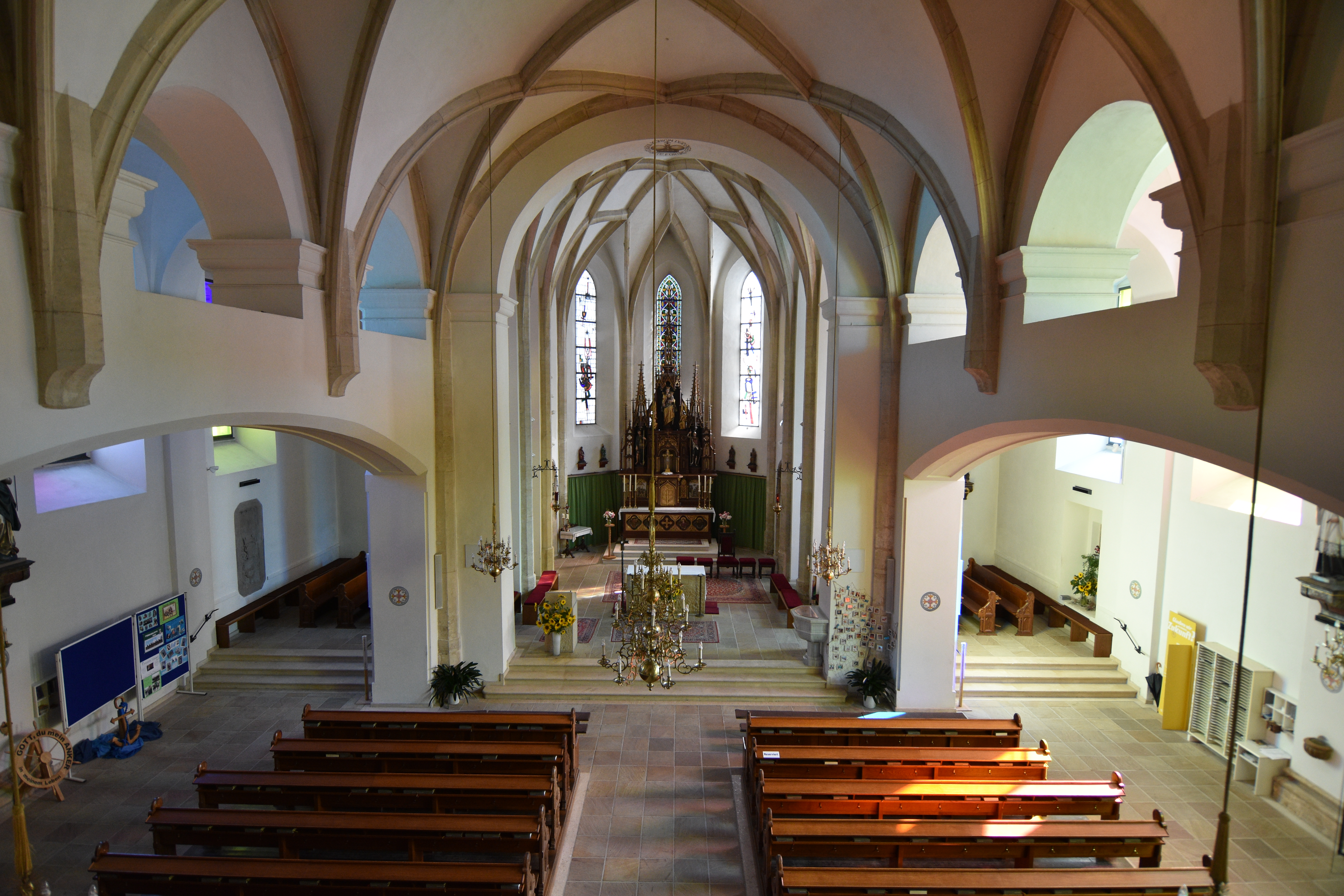 Saint Mary of the Angels Church Gnas Interior